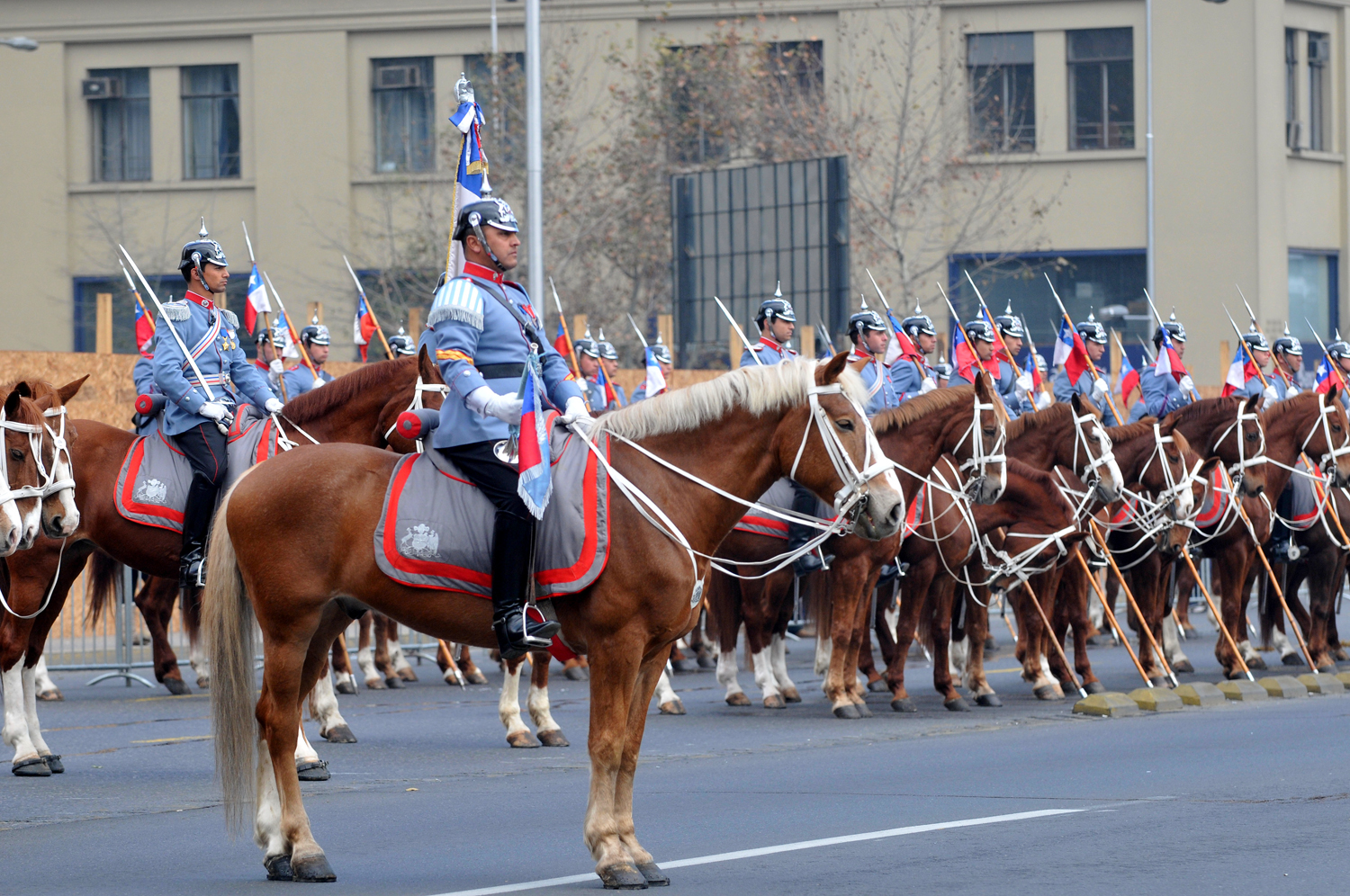 Ministra Cecilia Pérez asiste al izamiento de la Gran Bandera Nacional y entrega primer balance de participación en la Consulta Ciudadana sobre Discriminación en Chile